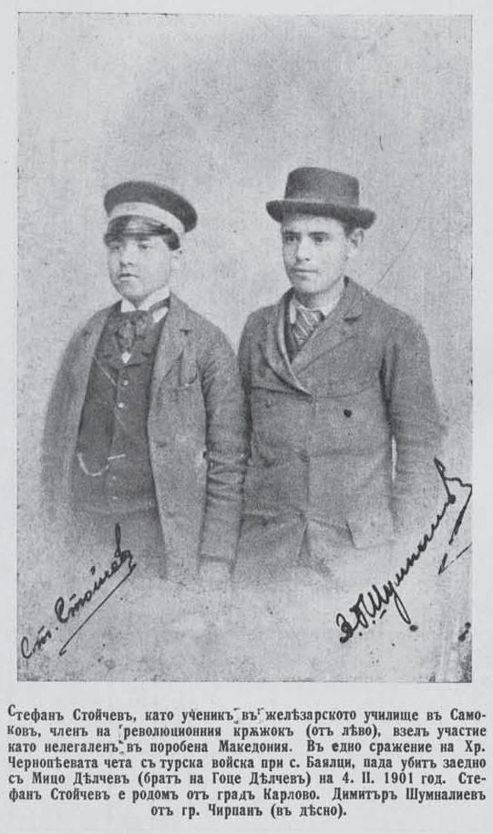 Stefan Stoychev and Dimitar Shumnaliev